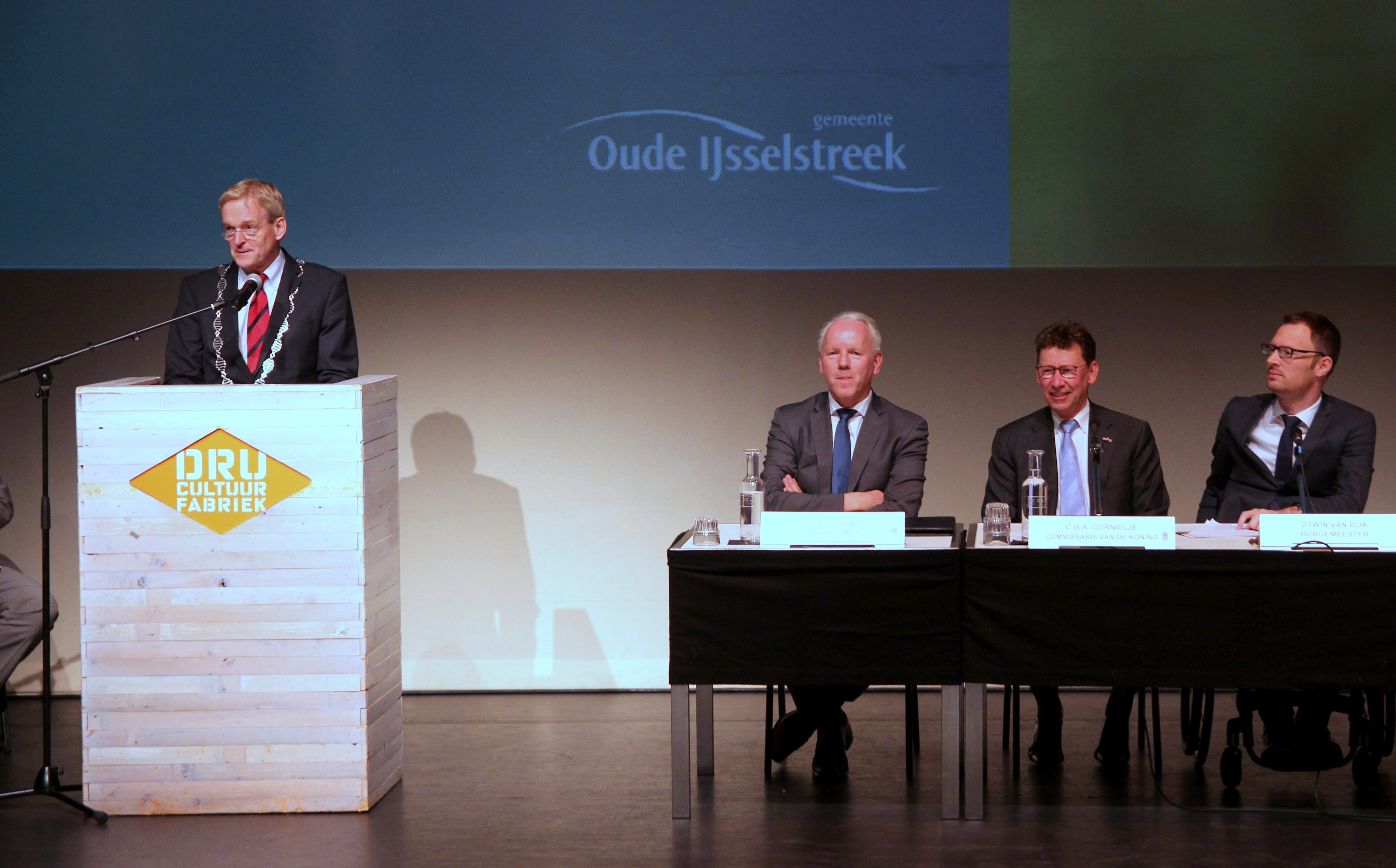 Benoeming nieuwe burgemeester van de gemeente Oude IJsselstreek, de heer Otwin van Dijk, in de theaterzaal van de DRU in Ulft.